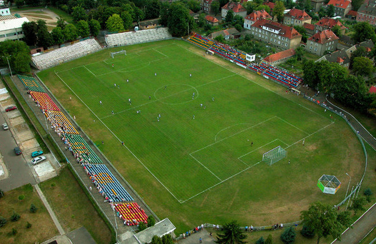 Stadion Błękitnych Stargard Szczeciński